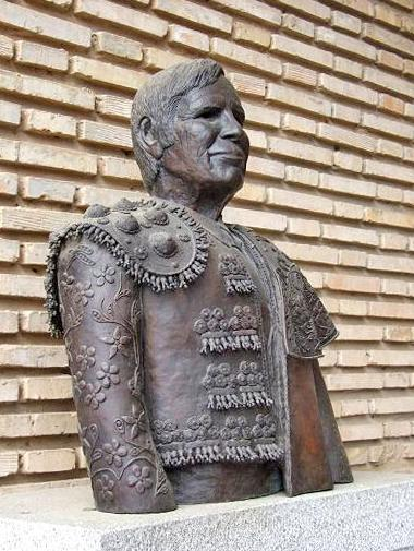 Figura del torero Manuel Benítez Pérez "El Cordobés" en la plaza de toros de Los Califas, Córdoba (España)